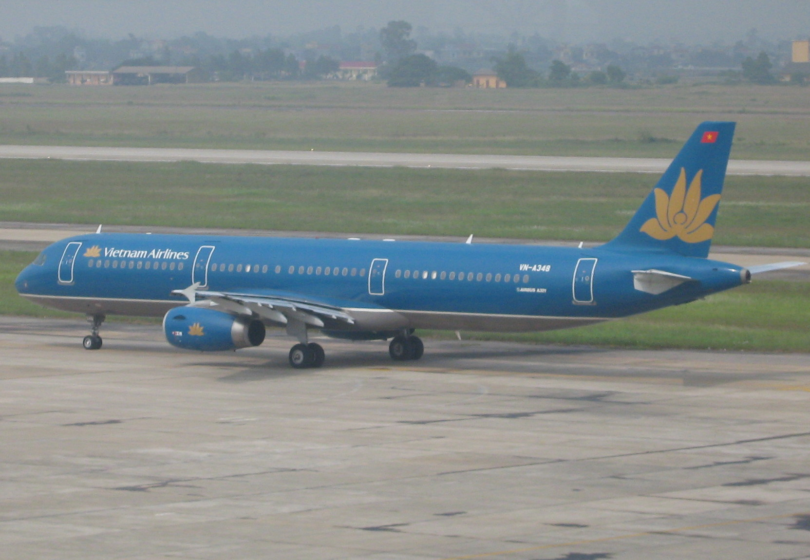 Airbus A321-231 der Vietnam Airlines (VN-A348) in Noibai